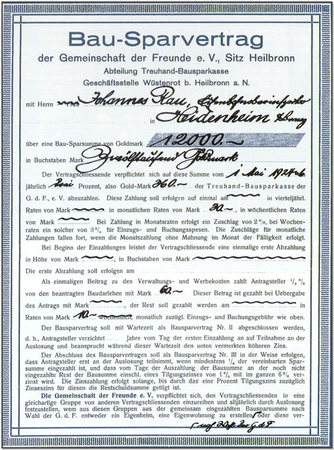 Bausparvertrag Utensil des Bauspar-Museum Wüstenrot